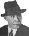 Alois Weinert (1875-1945), sudetoněmecký spisovatel